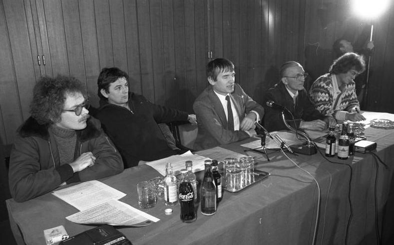 17.2.1983 Pressekonferenz der "Grünen" im Restaurant Tulpenfeld (zur Bundestagswahl am 6.3.1983)